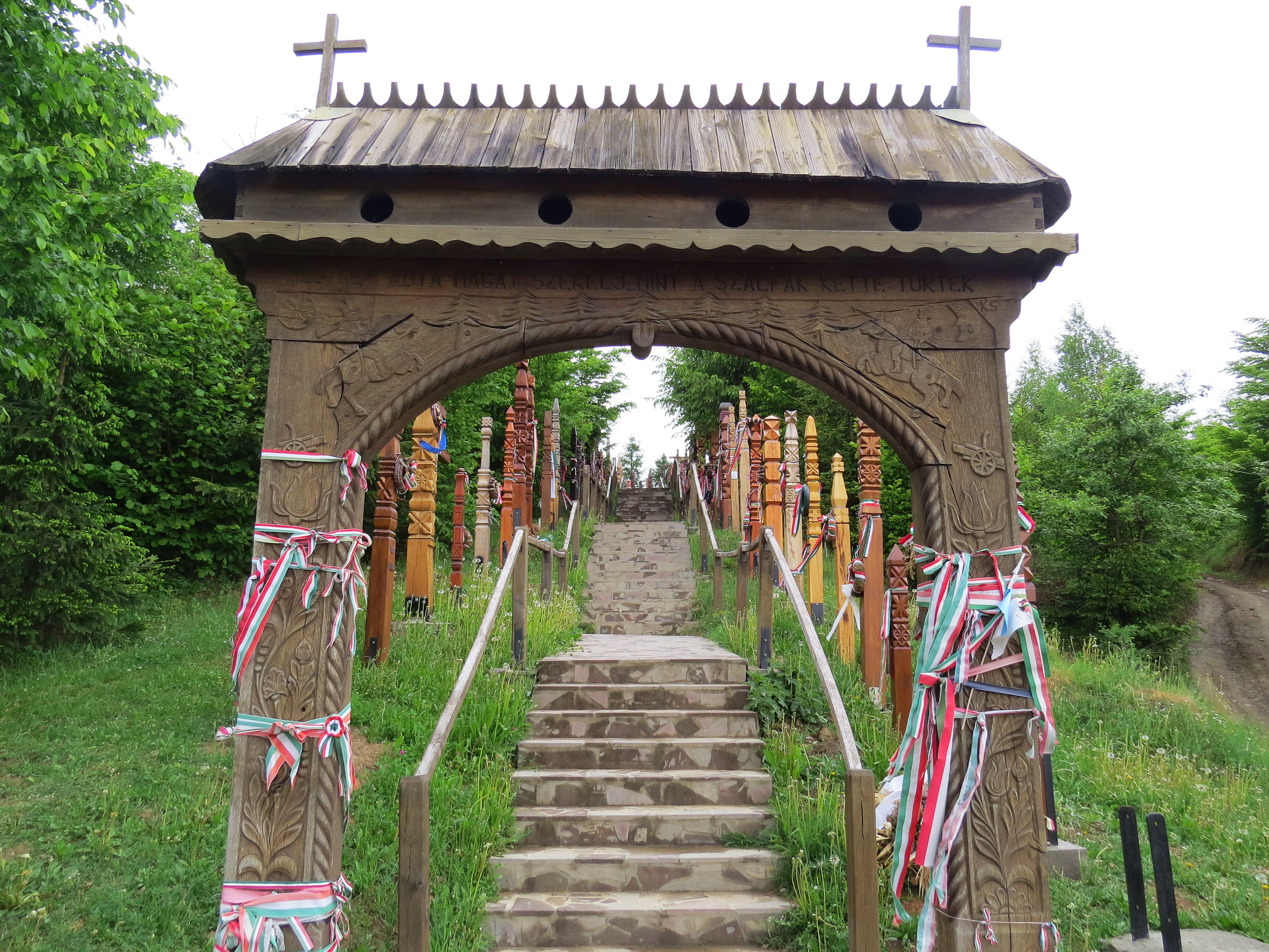 Nyerges-tető, az 1848–49-es forradalom és szabadságharc egyik utolsó székelyföldi csatájának színhelye. Az erdő szélén lévő területen, egy tömegsírba hantolták el akkor az ütközet áldozatait, akiknek emlékét többek közt számtalan kopjafa őrzi.